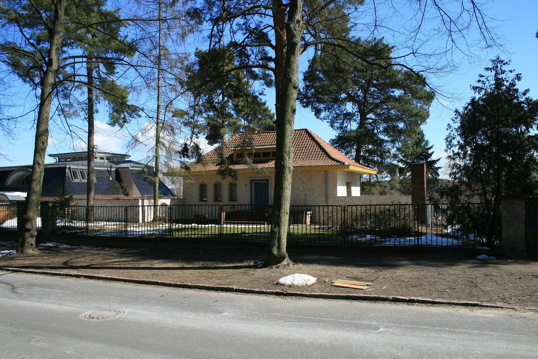 Potsdam OT Groß Glienicke, Seepromenade 41. Landhaus Abraham. Baudenkmal